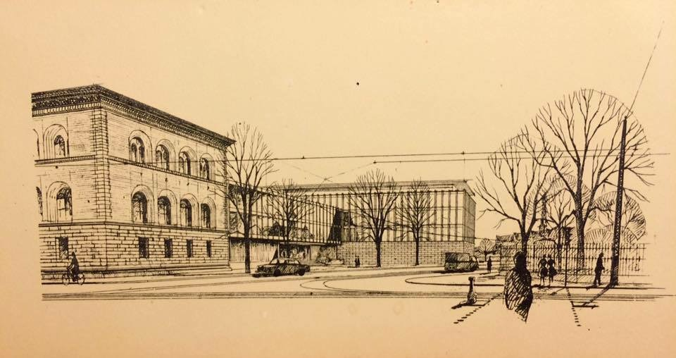 Nationalbankens nye bygning i konkurrence forslaget